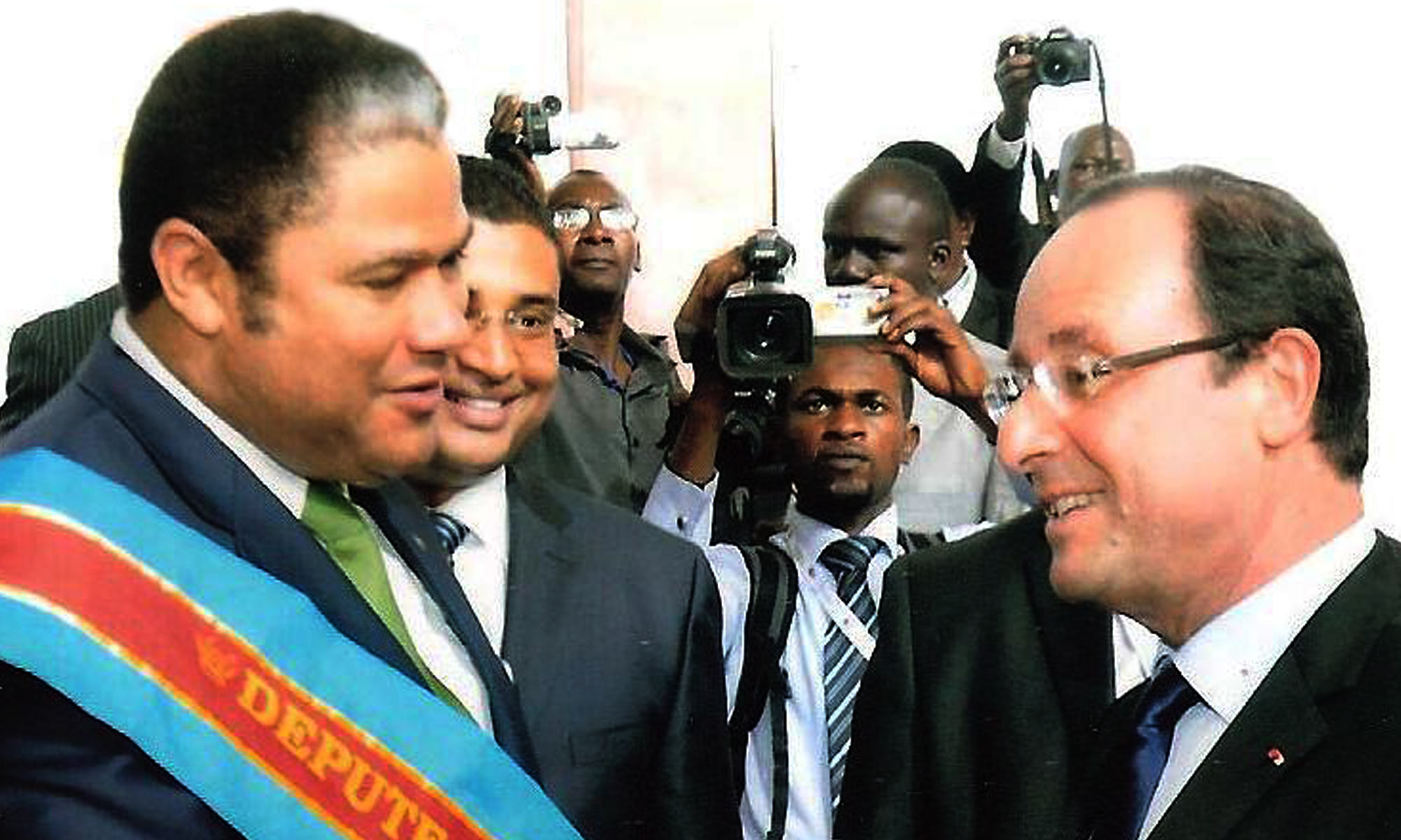 à l'occasion du XIVème sommet de la Francophonie qui s'est tenu à Kinshasa du 10 au 12 octobre 2012